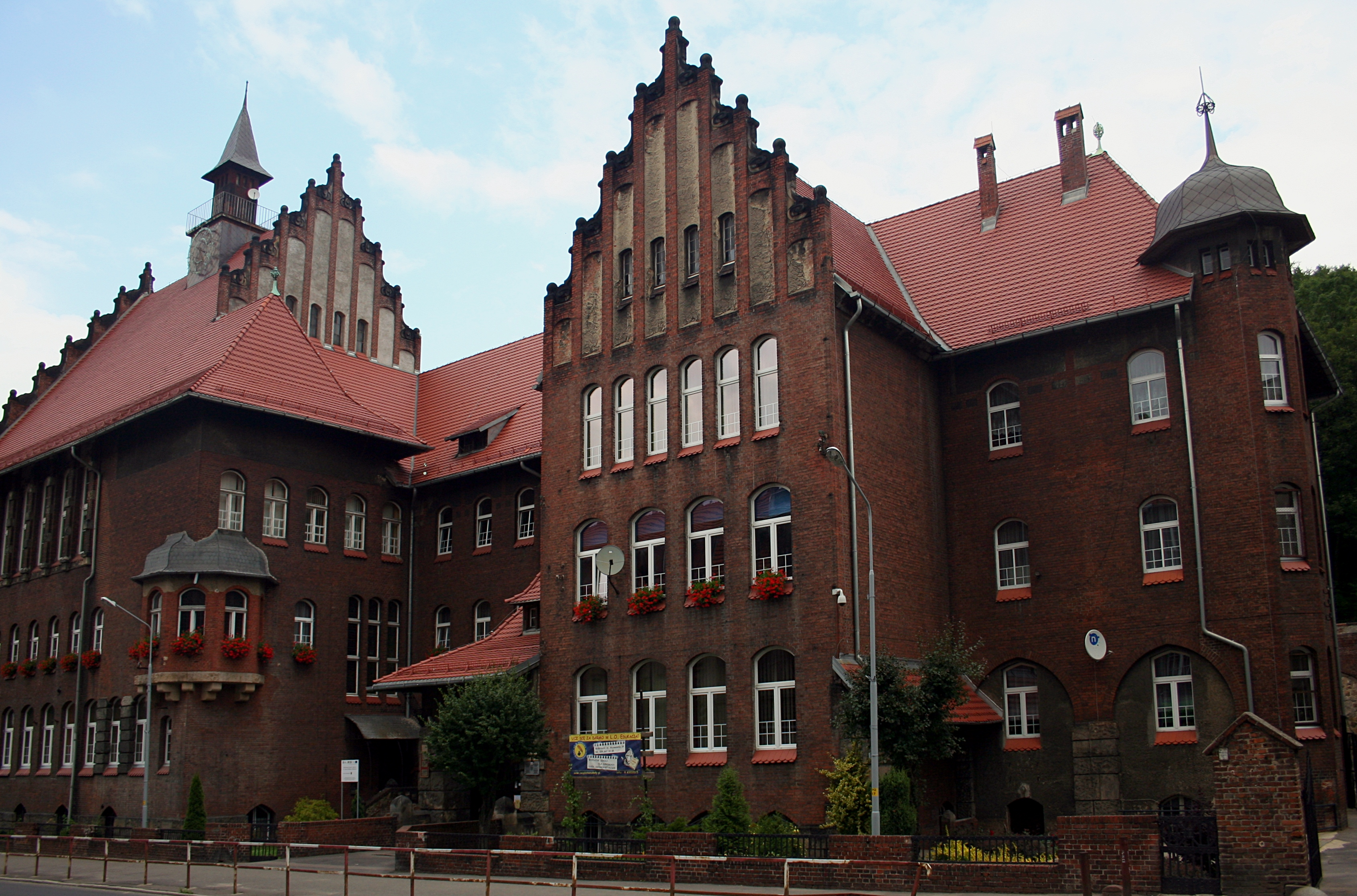 II LO im. Hugona Kołłątaja w Wałbrzychu, Aleja Wyzwolenia 34